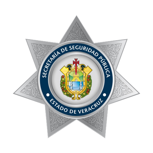 Logo de la Policía estatal de Veracrzu